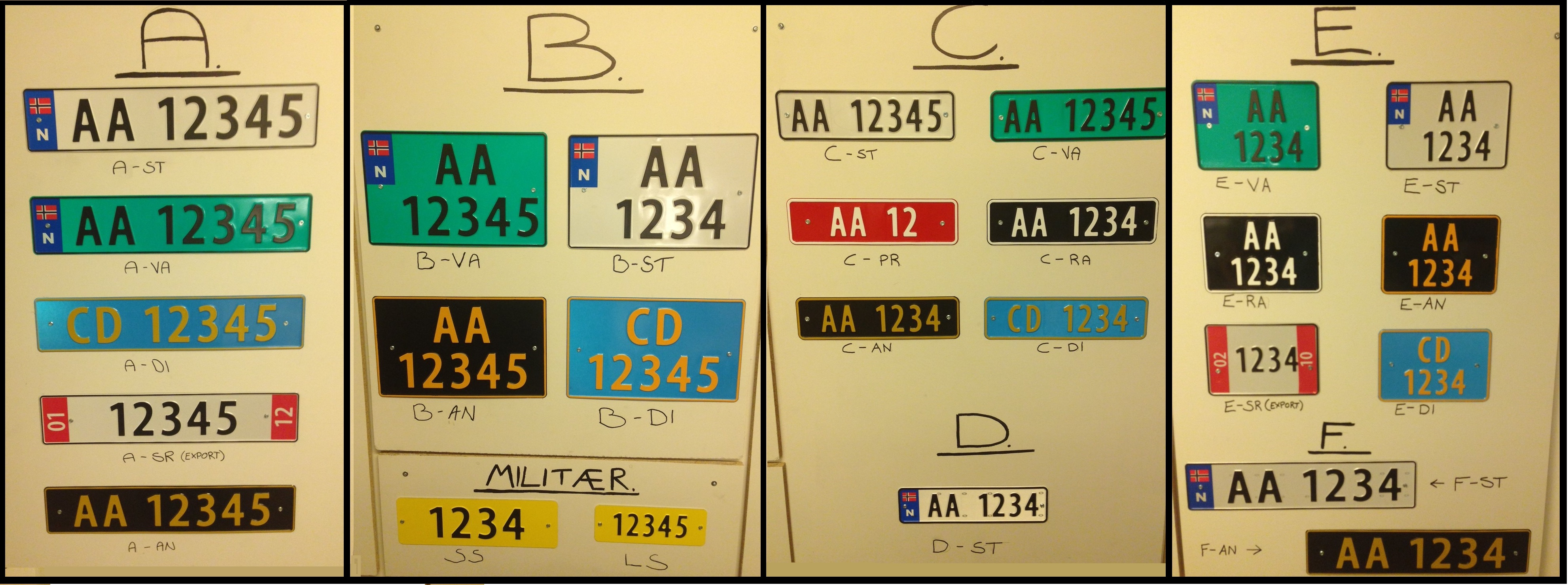 Samlet oversikt over alle skilt i Norge.